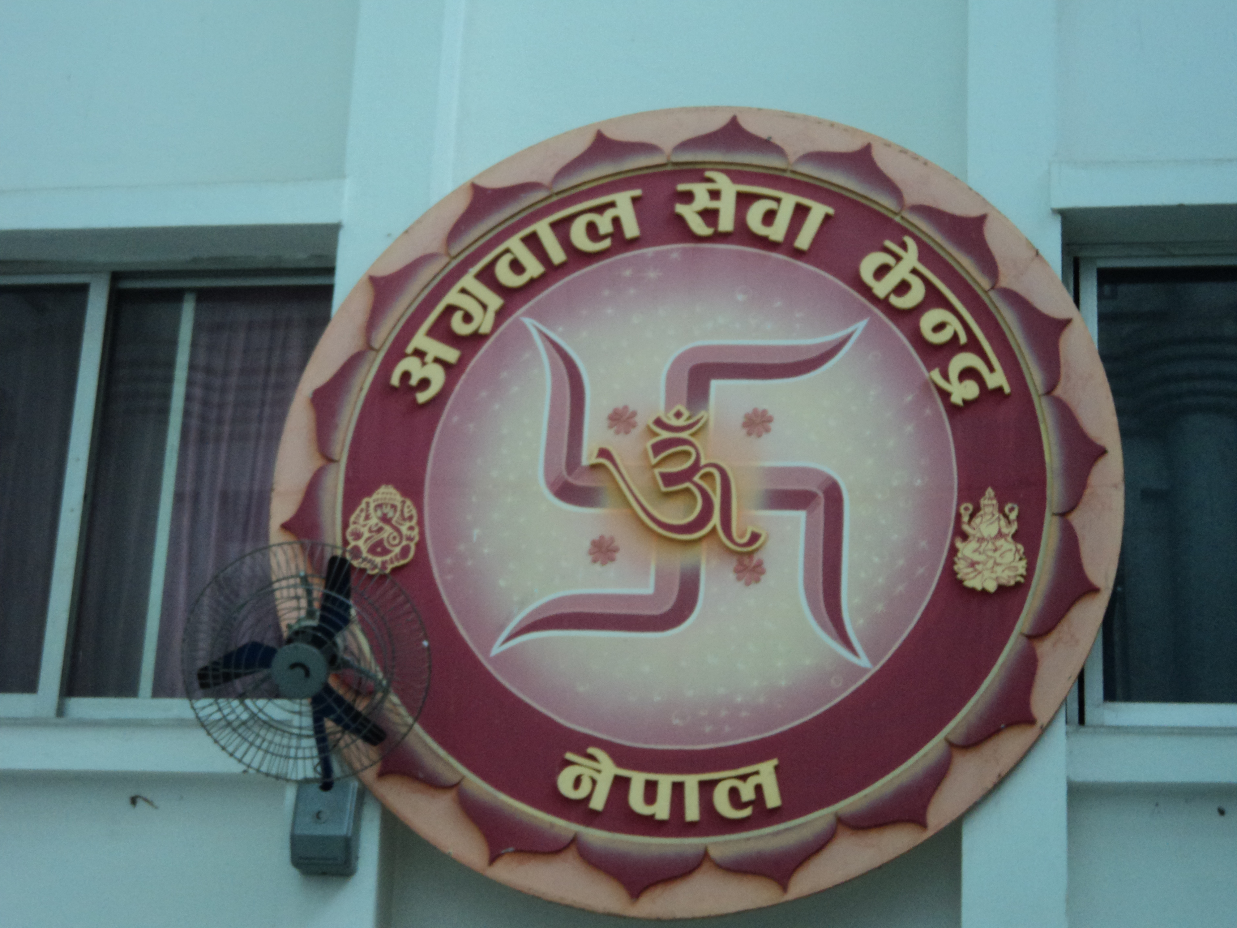 नेपाली: अग्रवाल सेवा केन्द्र